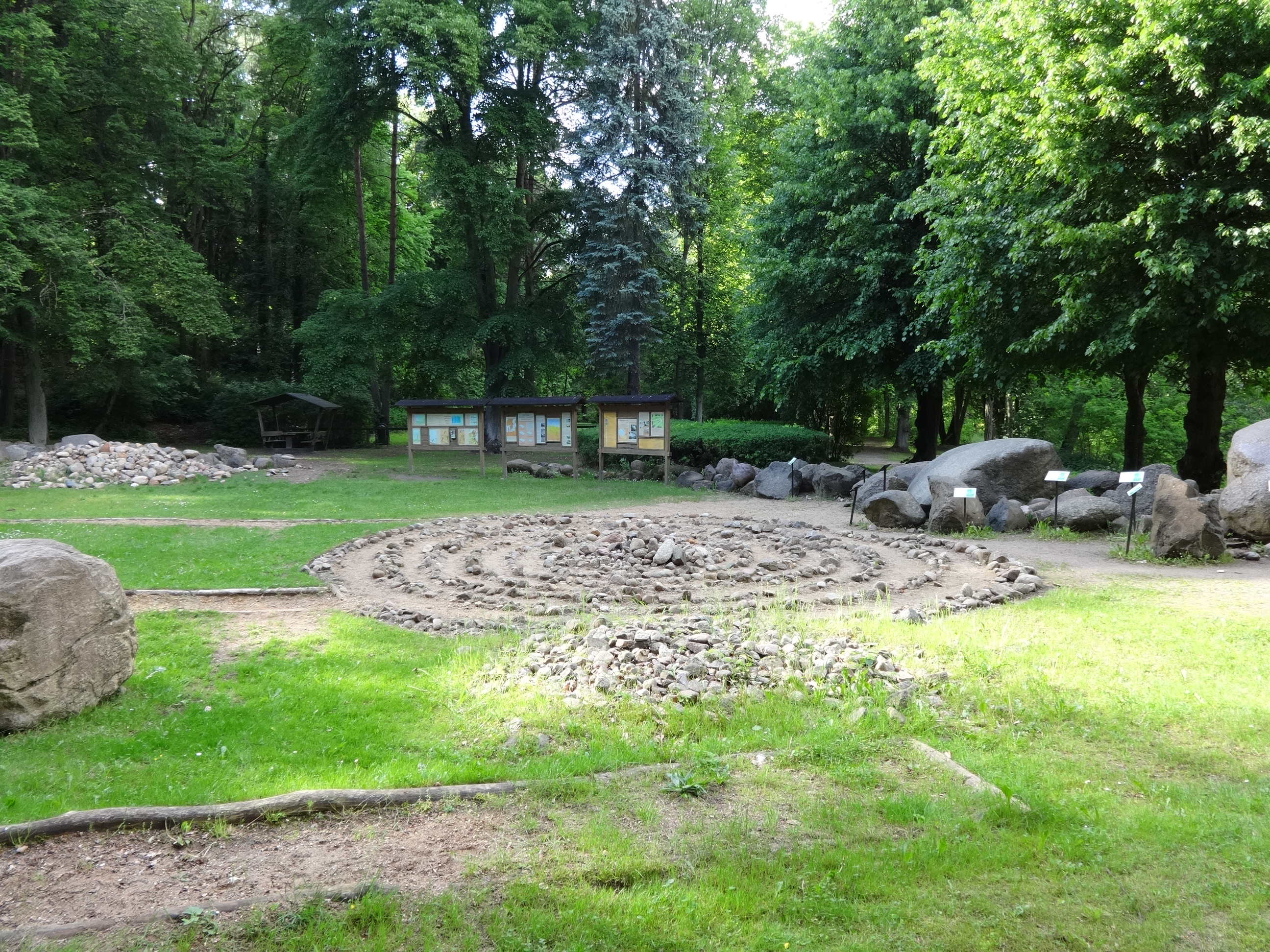 Eiszeitgarten Buckow (Märkische Schweiz) - eine gärtnerische Darstellung der eiszeitlich geprägten Landschaft um Buckow, gelegen im Lunapark an der Buckowseepromenade in Buckow